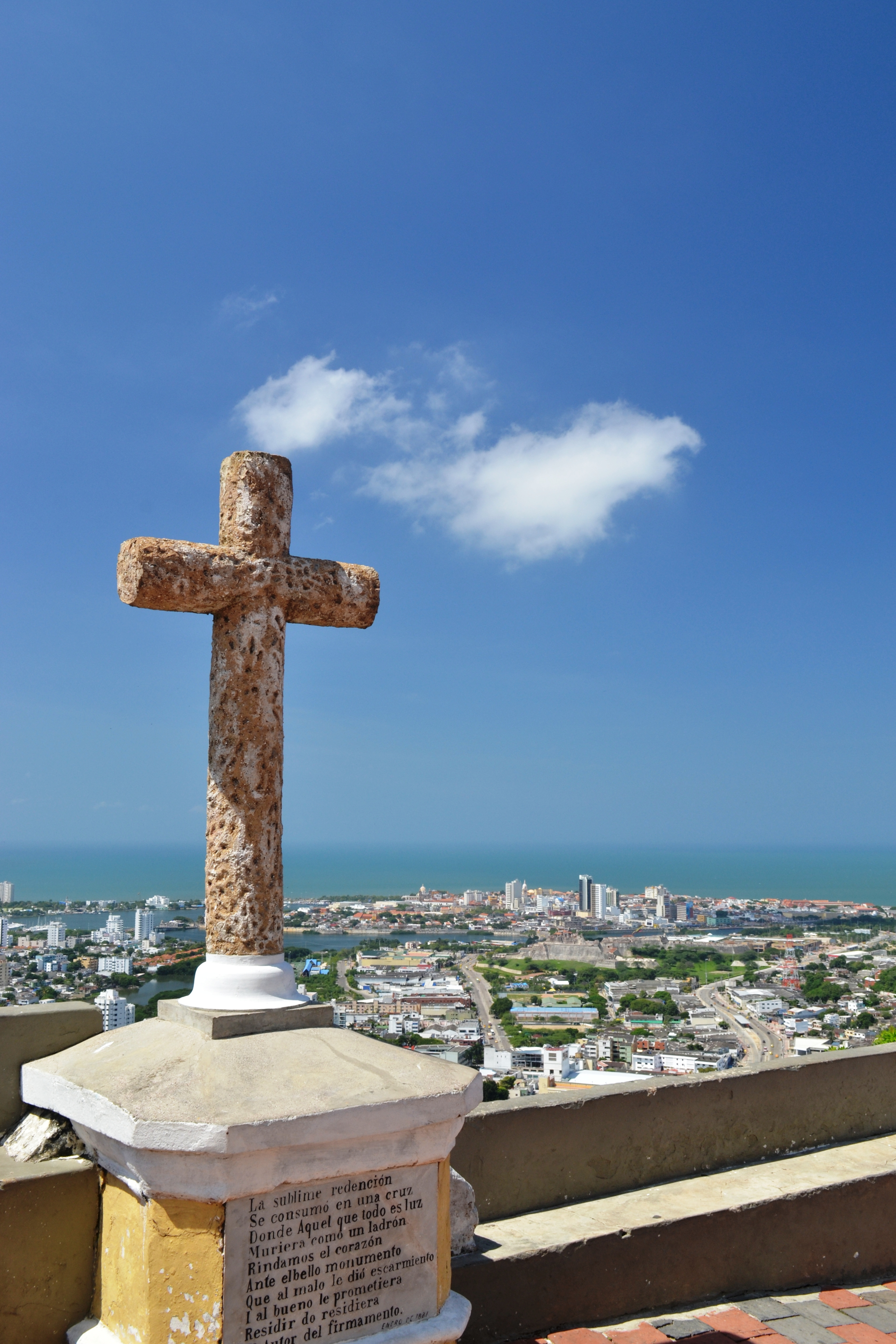 Iglesia y Convento de Santa Cruz de La Popa